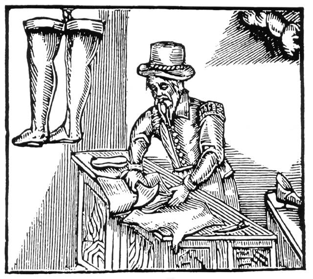 Gonçalo Annes Bandarra ou ainda, Gonçalo Anes, o Bandarra (Trancoso, 1500 — Trancoso, 1556) foi um sapateiro e profeta português, autor de Trovas messiânicas que ficaram ligadas ao sebastianismo e ao milenarismo português.